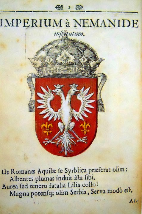 Грб Немањића (Стематографија Христифора Жефаровића)